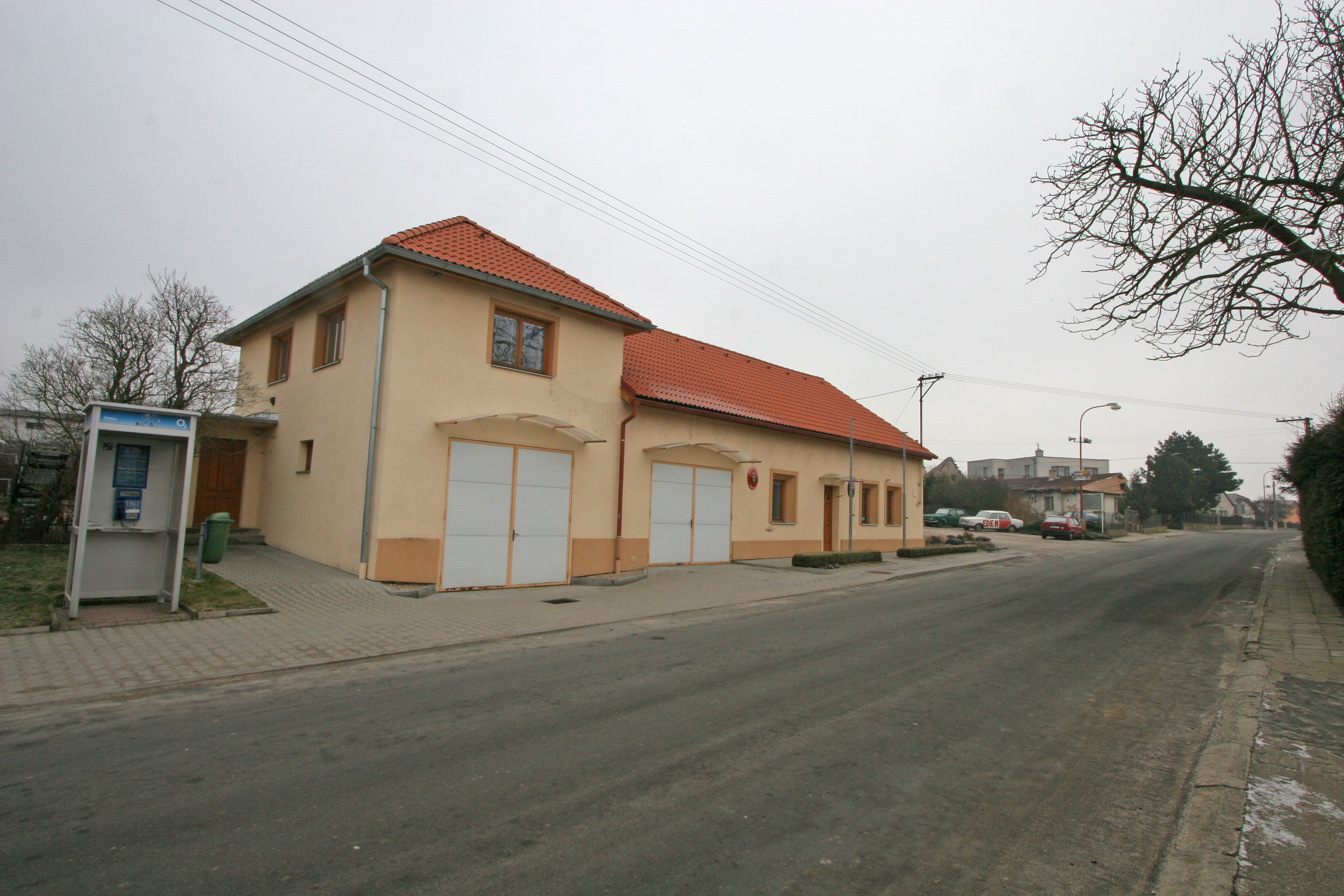 Vyšehněvice obecní úřad